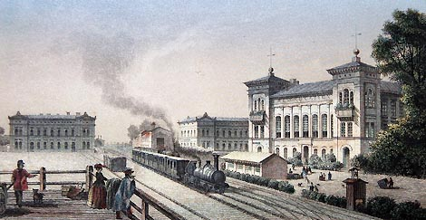 Stahlstich des Köthener Bahnhofareals um 1850